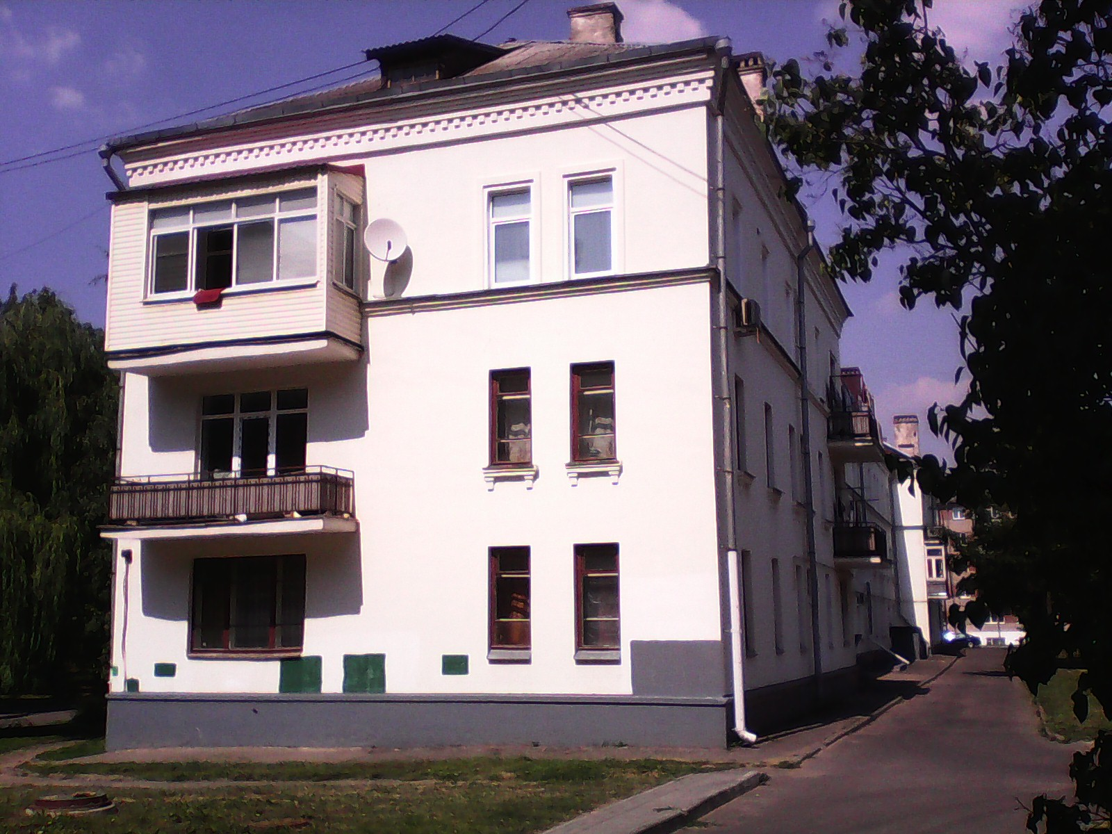 Масюковщина - дом 71